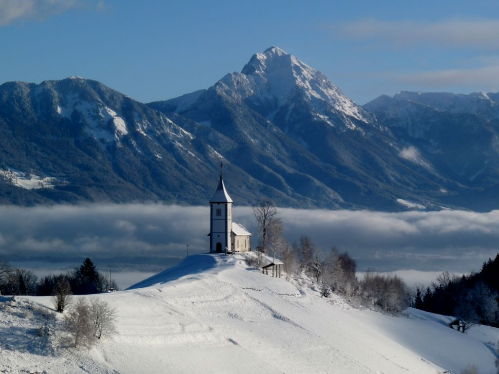 Jamnik s Strožičem